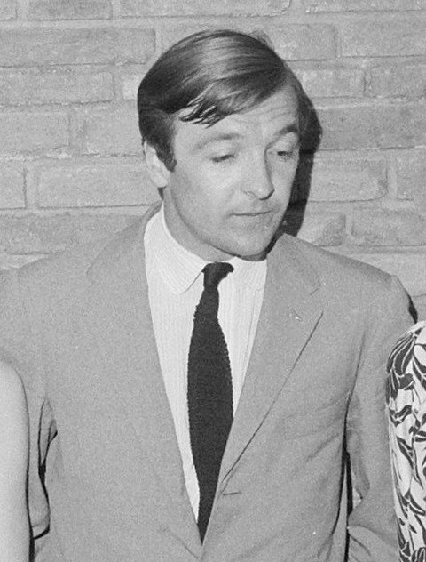 Royal Ballet uit Engeland in Hiltonhotel te Amsterdam, Graham Usher.